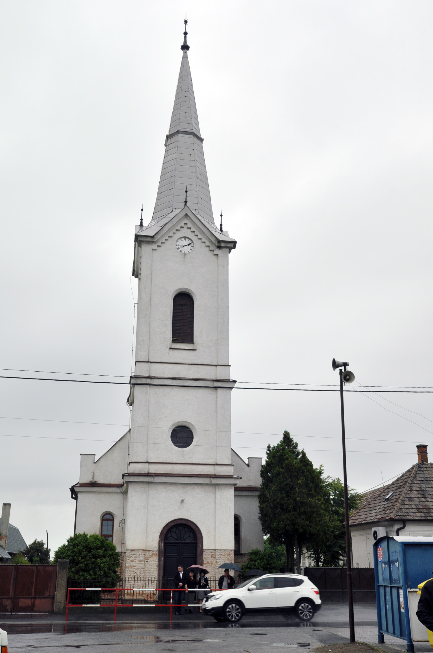 Reca - kostol Reformovanej cirkvi